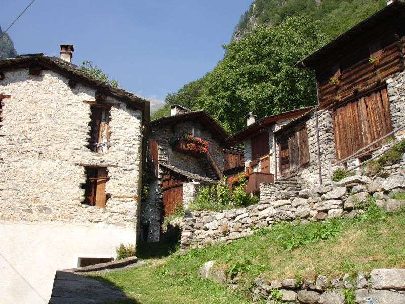 Savogno